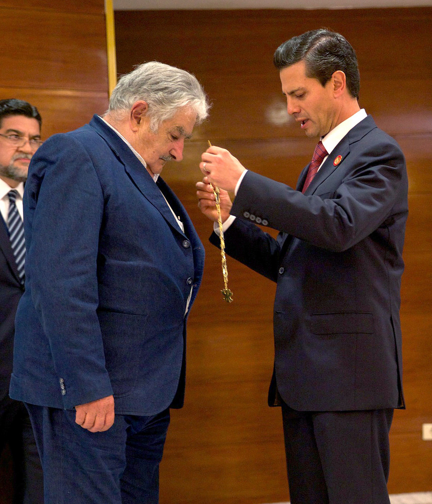 Almuerzo que en honor del Excmo. Sr. José Mujica Cordano, Presidente de la República Oriental del Uruguay, ofrece el Lic. Enrique Peña Nieto, Presidente de los Estados Unidos Mexicanos. La Habana, Cuba. 27 de enero de 2014.